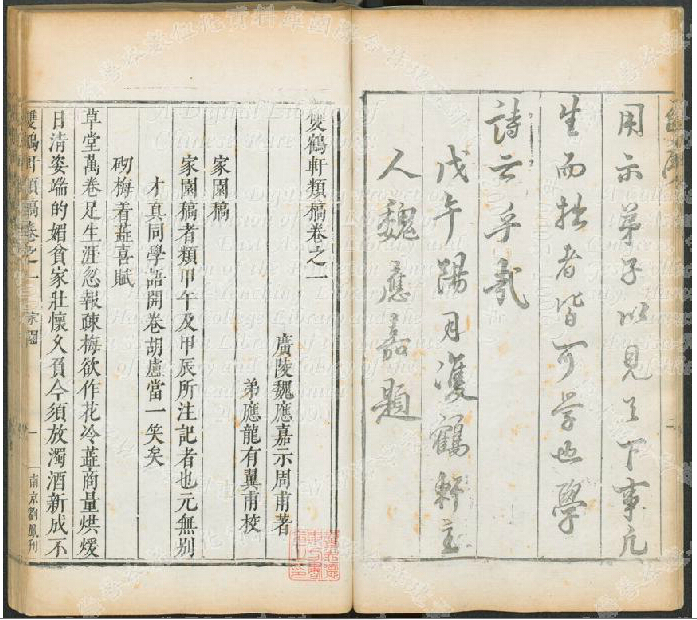 中文（中国大陆）: 双鹤轩类稿书影，明魏应嘉撰